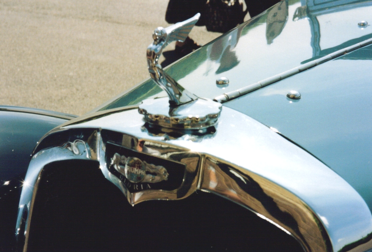 Triumph gloria, Emplem, Figur. Foto in England